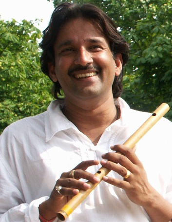 Dinesh Mishra. Summer 2008